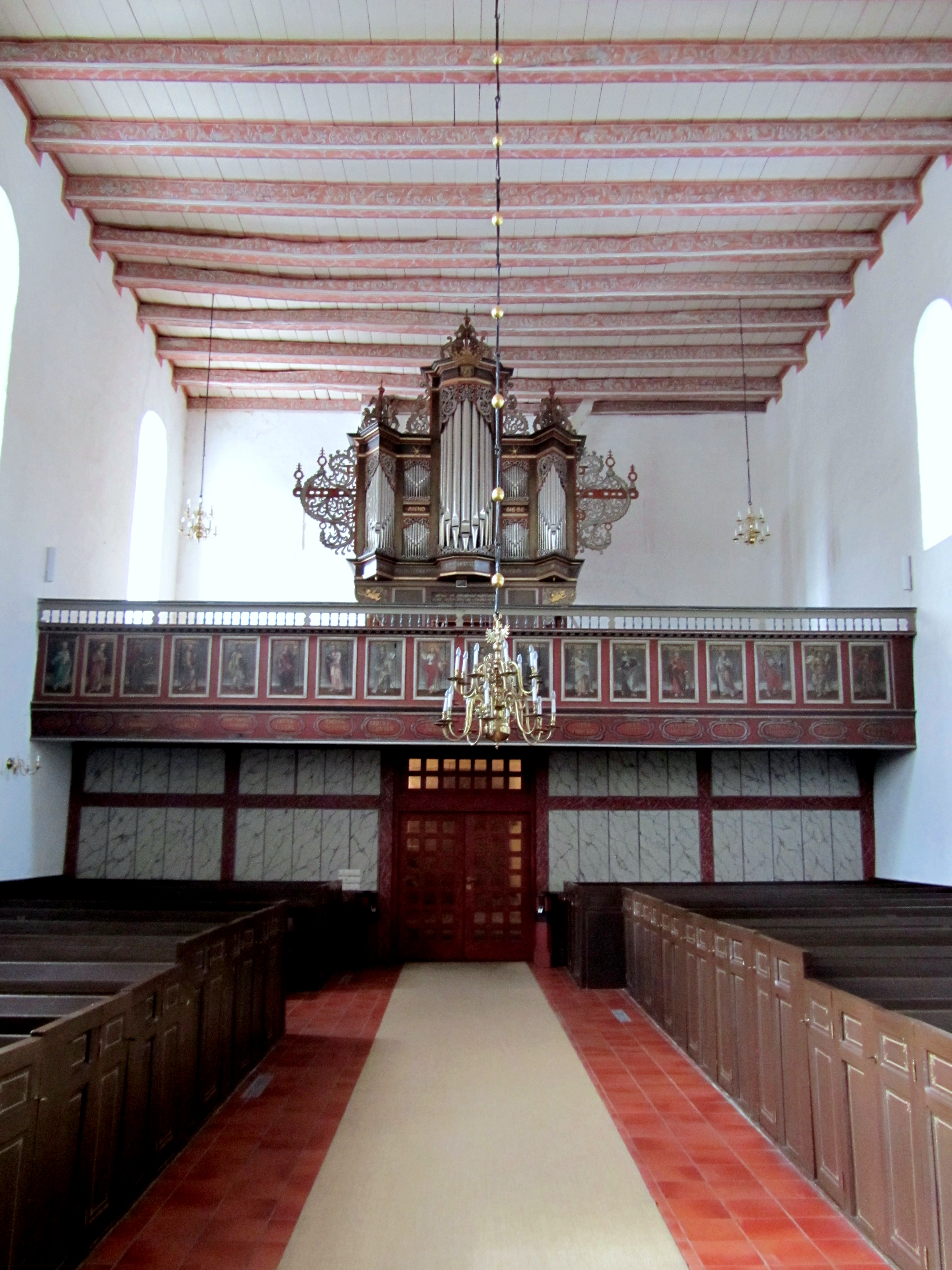 Orgel der St.-Stephanus-Kirche in Schortens, Niedersachsen, Deutschland